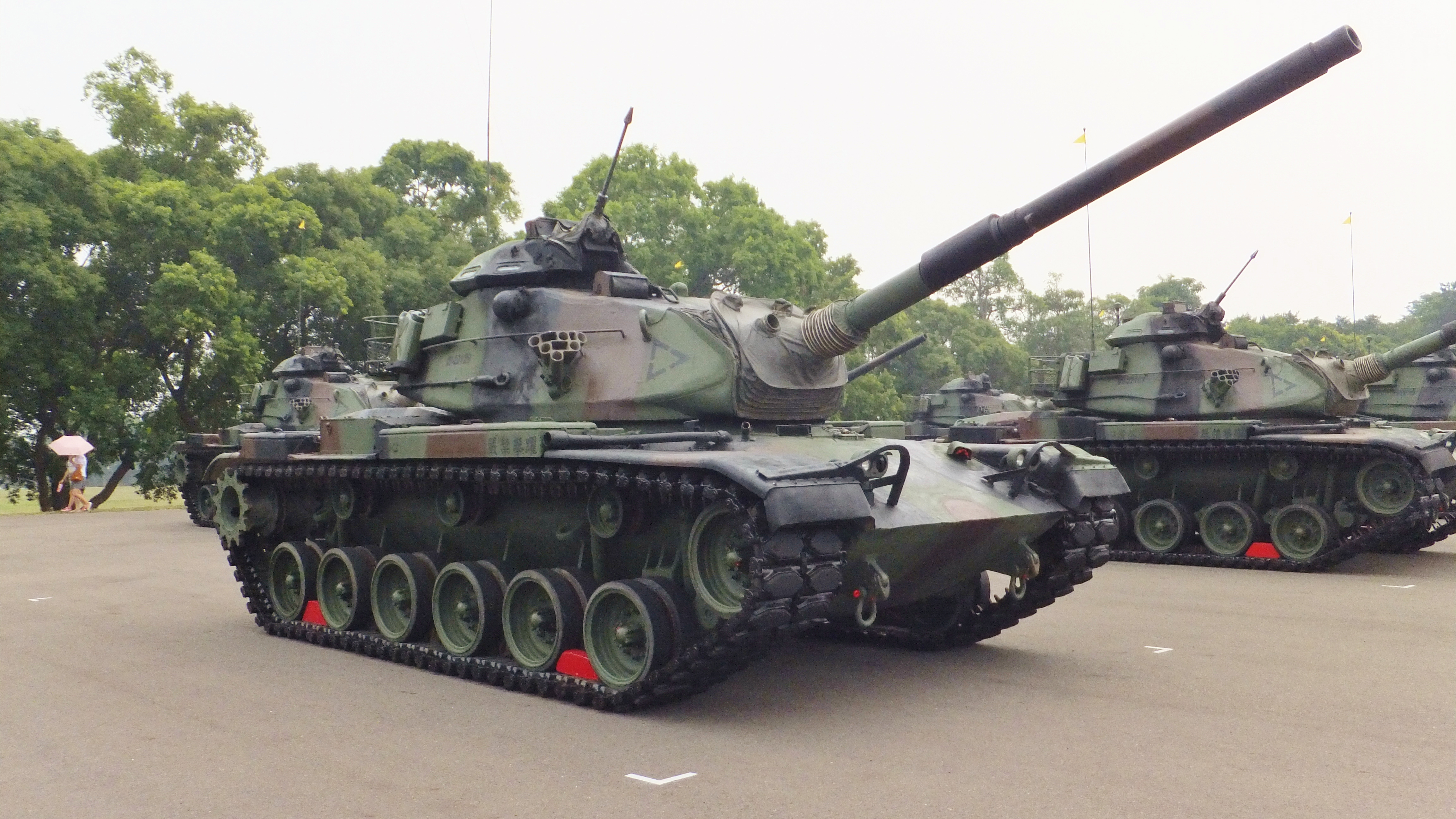 2011年成功嶺營區開放活動，介壽臺大校場展示的中華民國陸軍M60A3 TTS群。